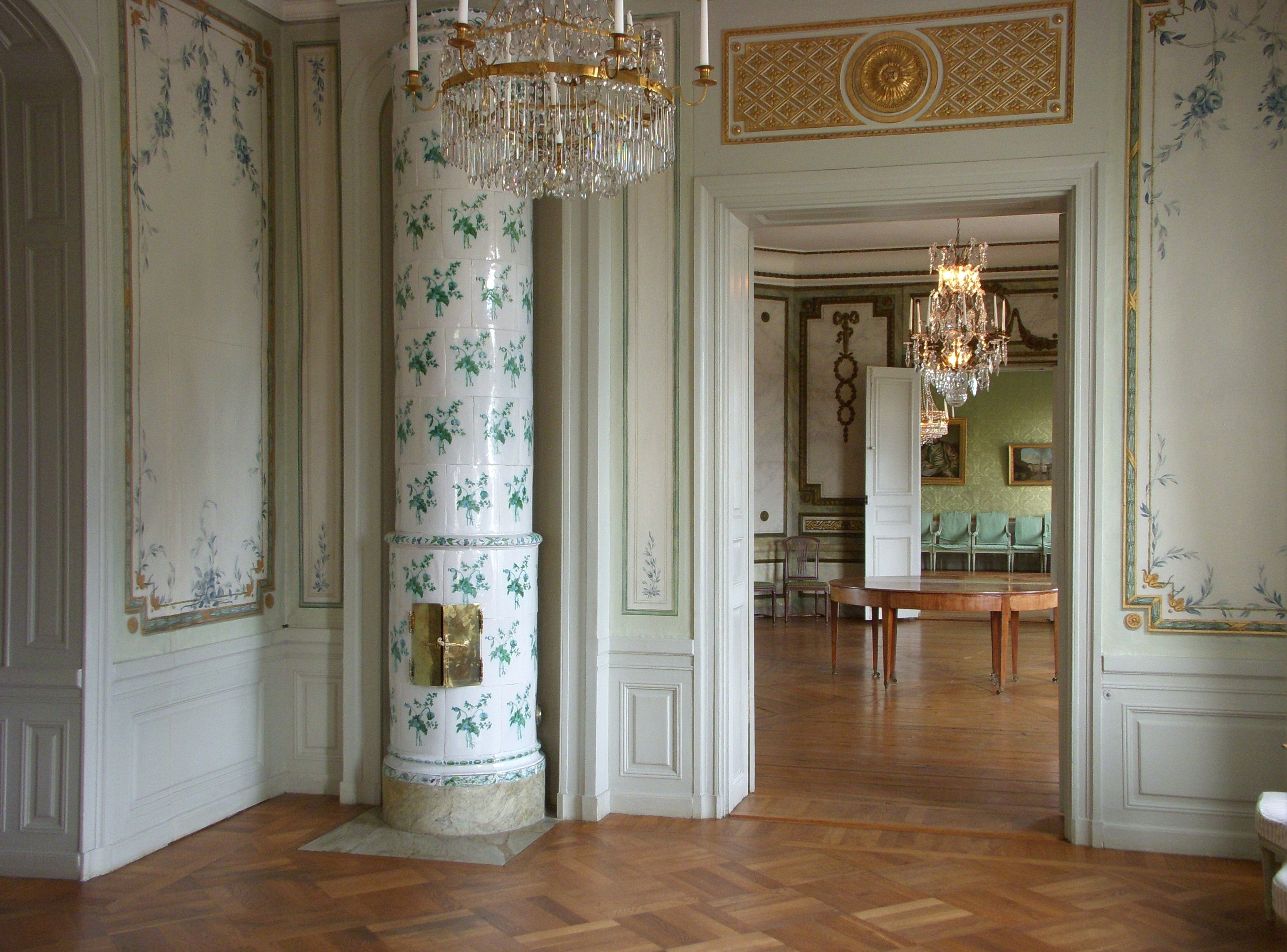 Sturehov slott interiör, vån 1 tr. "Stora sängkammaren"